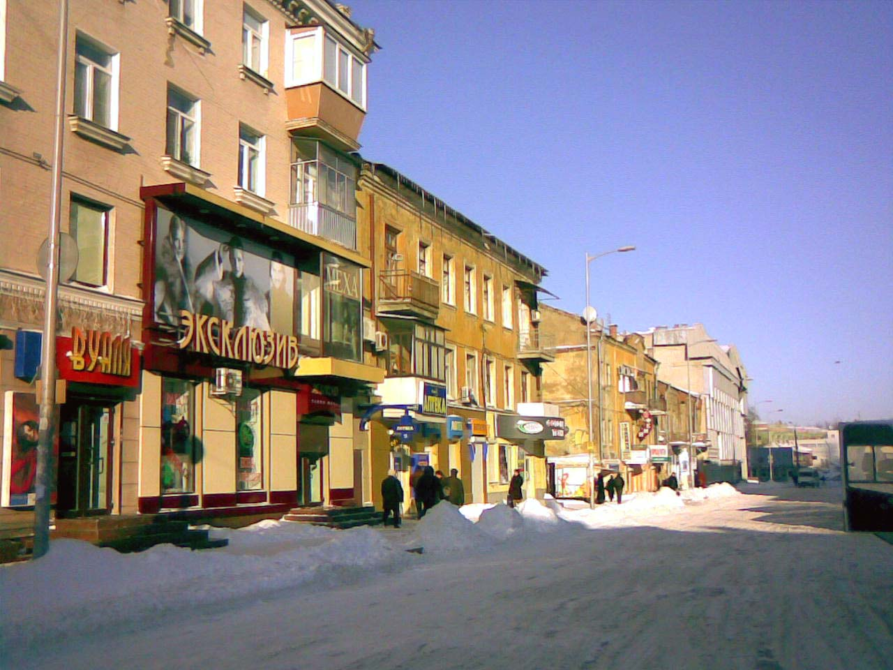 Ул. Харьковская зимой. Вид от перекрестка с ул. Ширшова на север.